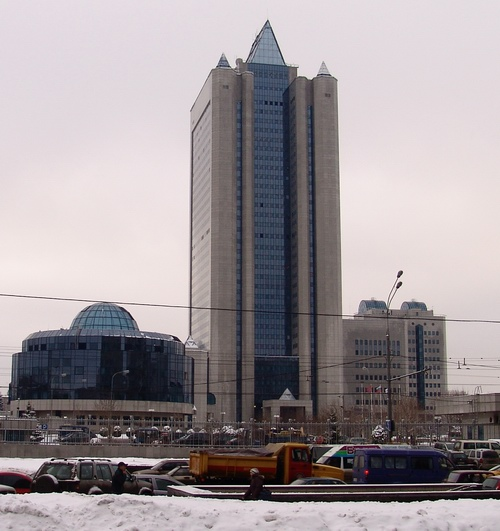 ОАО "Газпром"